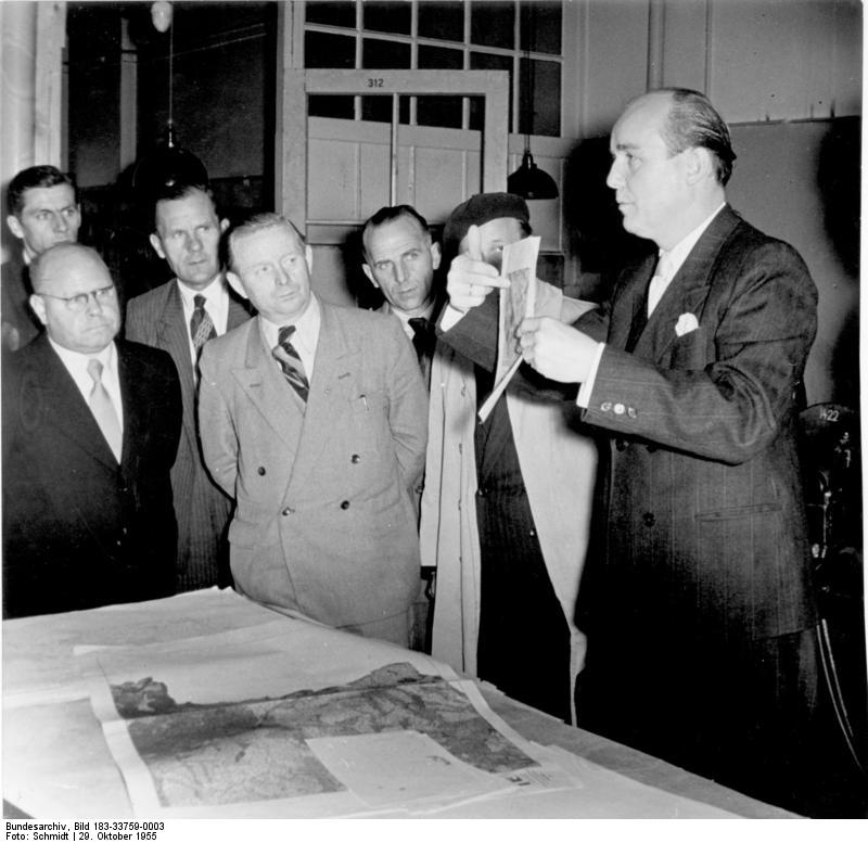 Zentralbild/Schmidt - Bez. Red. Erfurt 31.10.1955 -Ehrung für den Senior der deutschen Karthographie Nationalpreisträger Professor Dr. Dr. h.c. Hermann Haack in Gotha Am 29.10.1955 feierte der Senior der deutschen Kartographie Nationalpreistäger Professor Dr. Dr. h.c. Hermann Haack seinen 83. Geburtstag. Aus Anlaß dieses Tages wurde der weltbekannte VEB Geographisch-Kartographische Anstald Gotha auf Beschluß der Regierung in VEB Hermann Haack Geographisch-Kartographische Anstalt Gotha umbenannt. UBz.: Der technische Leiter des VEB Hermann Haack Geographische und Kartographische Anstalt Gotha, Richard Sommerer erläutert den Ehrengästen während einer Betriebsbesichtigung in der Abteilung Andruck die Herstellung des Farbbildes einer Wandkarte.